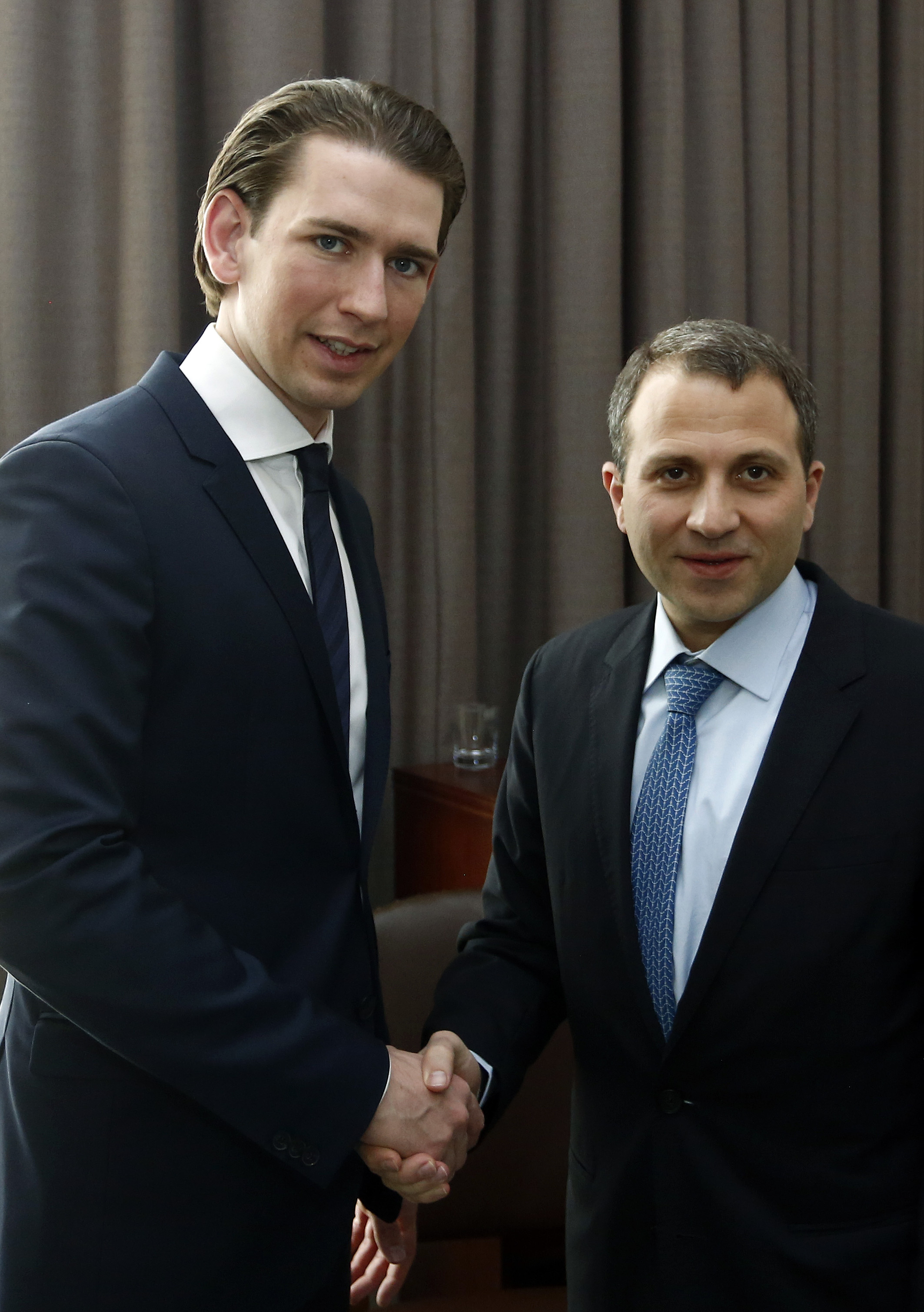 Arbeitsbesuch New York. Teilnahme von Bundesminister Sebastian Kurz an der Sitzung des UN Sicherheitsrates zum Thema Schutz von Minderheiten im Nahen Osten. Treffen mit dem libanesichen Aussenminister Gebran Bassil. New York, UNO, 27.03.2015, Foto: Dragan Tatic